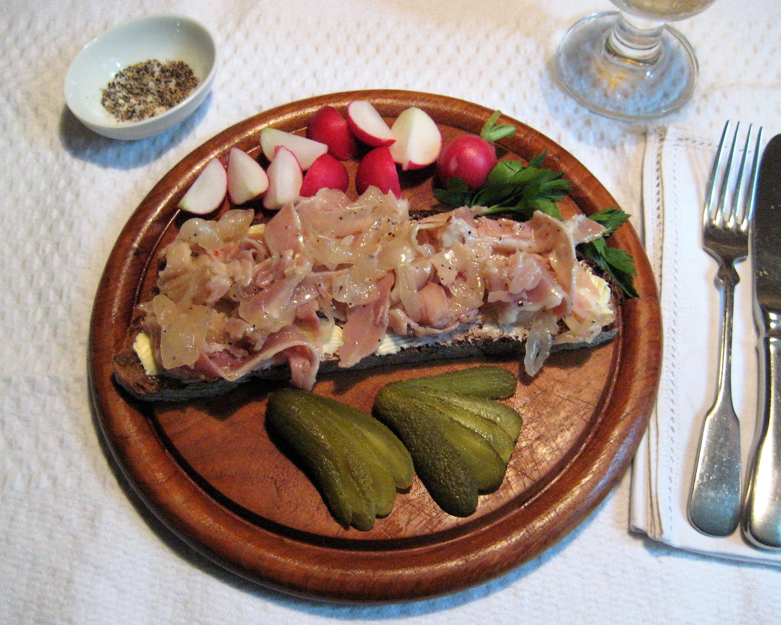 Zwiebelfleisch (kalt zubereitet und eingelegt) auf Graubrot.